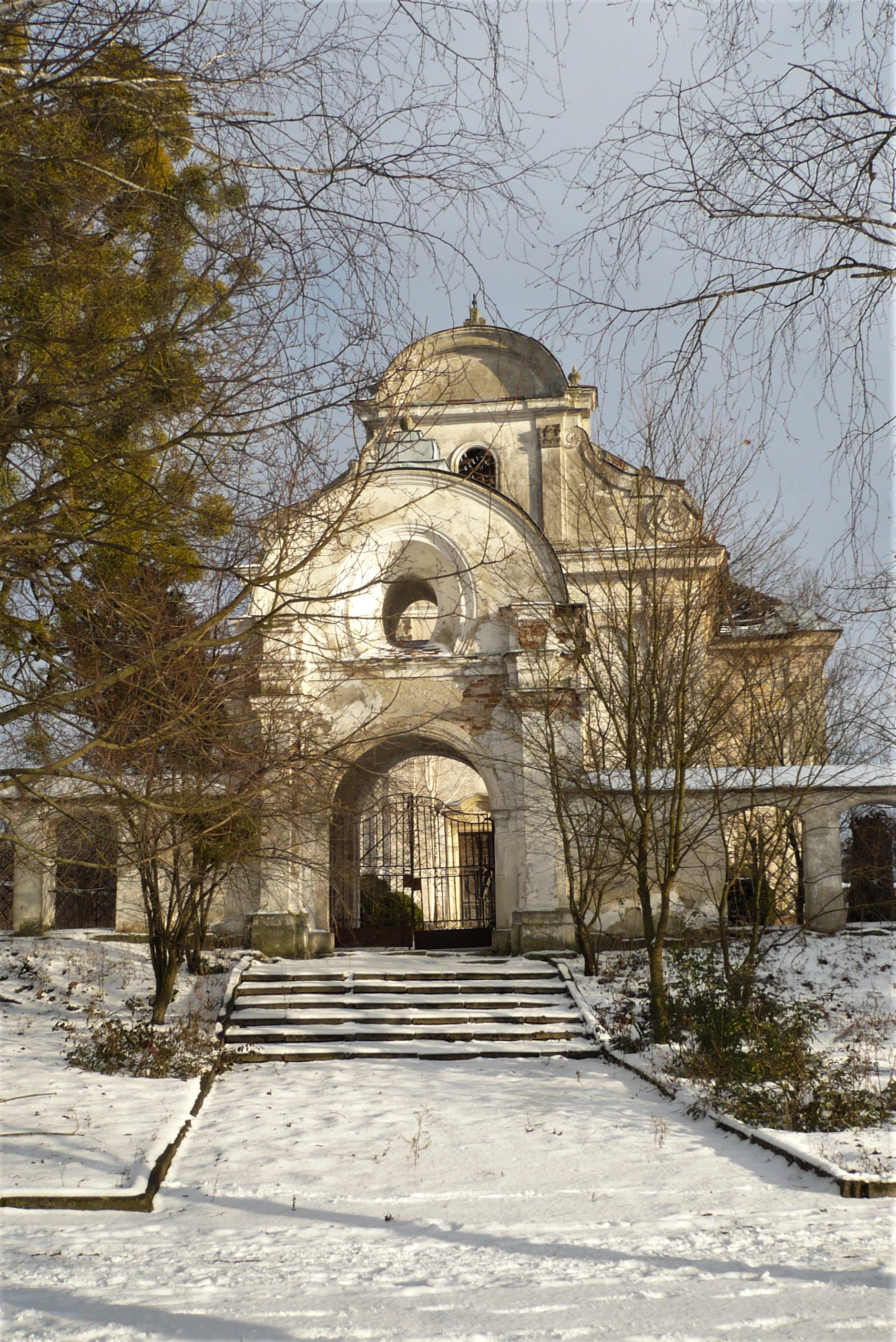 Biały Kamień. Kościół